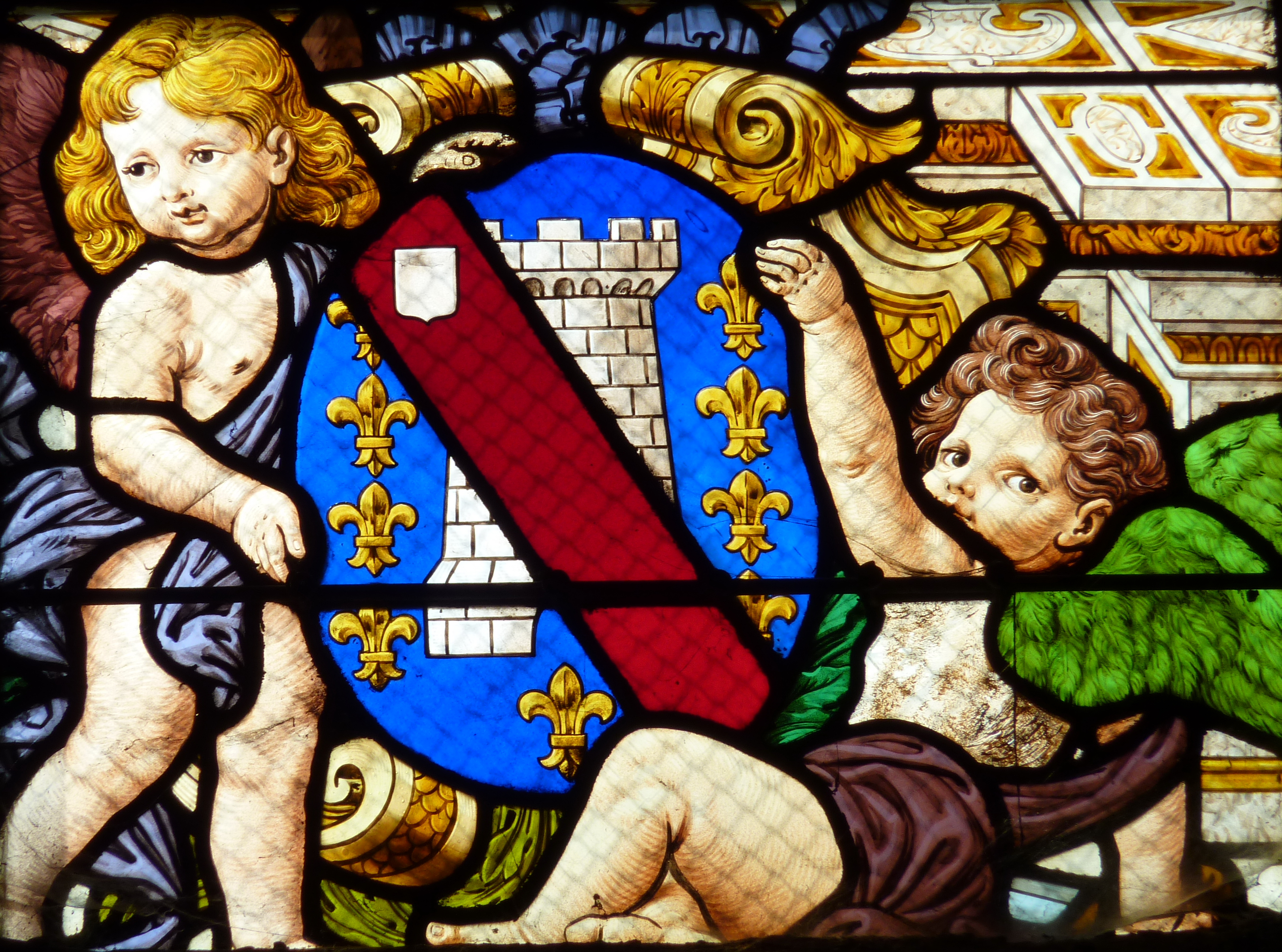 Bleiglasfenster (Ausschnitt) in der katholischen Pfarrkirche Saint-Martin (Collégiale Saint-Martin) in Montmorency,Darstellung: Wappen von Henri de La Tour d’Auvergne, Fenster aus dem 19. Jahrhundert